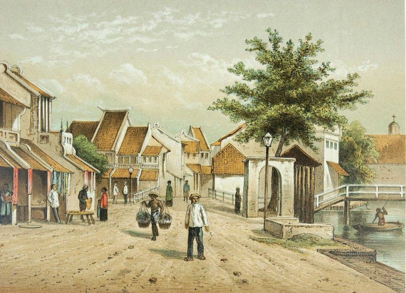 Litho. Litho naar een oorspronkelijke aquarel van Rappard. Chinees kamp bij de kleine poort